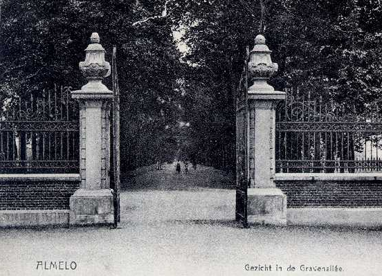 Toegangshek van Huize Almelo